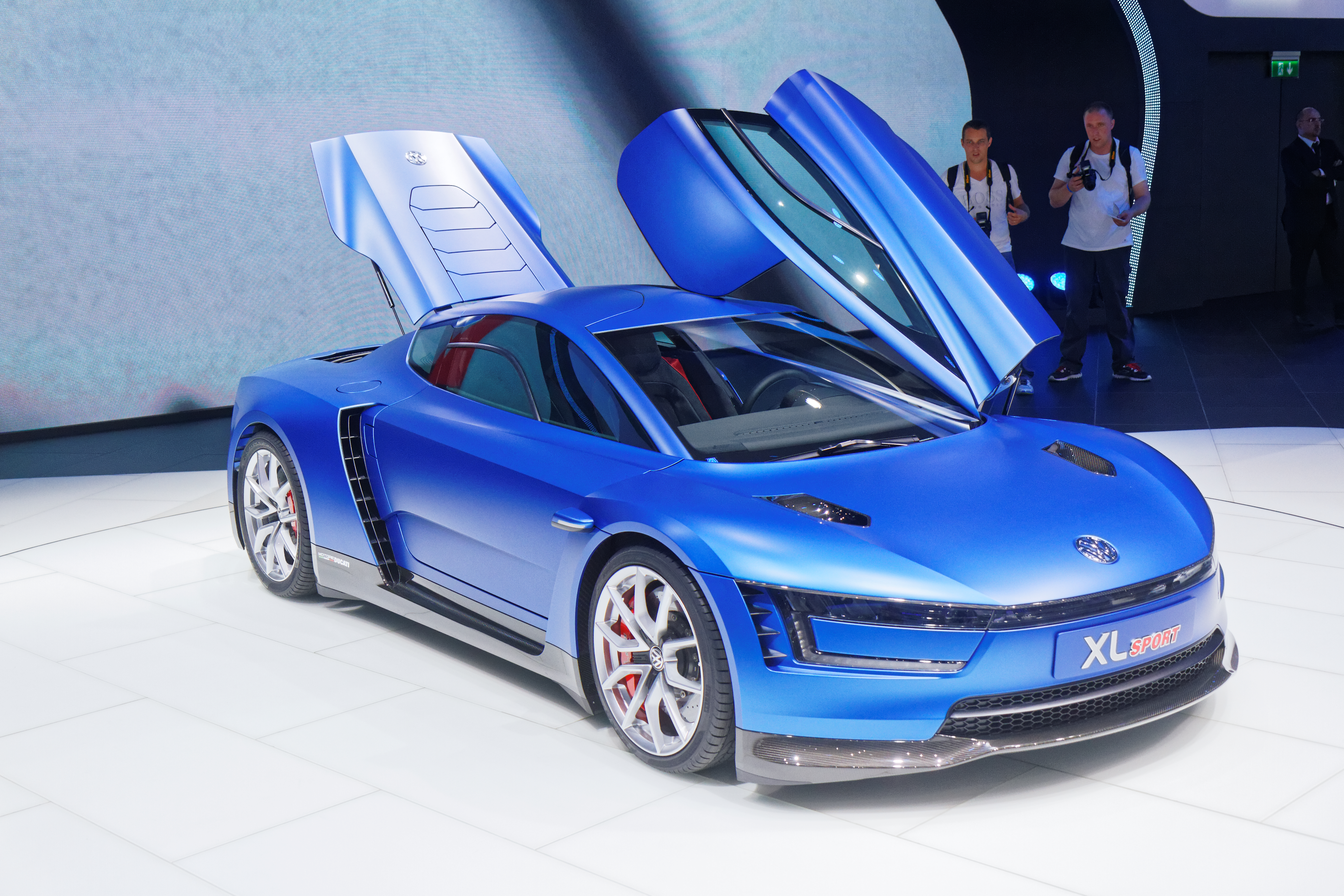 Une Volkswagen XL sport présentée lors du mondial de l'automobile de Paris 2014.